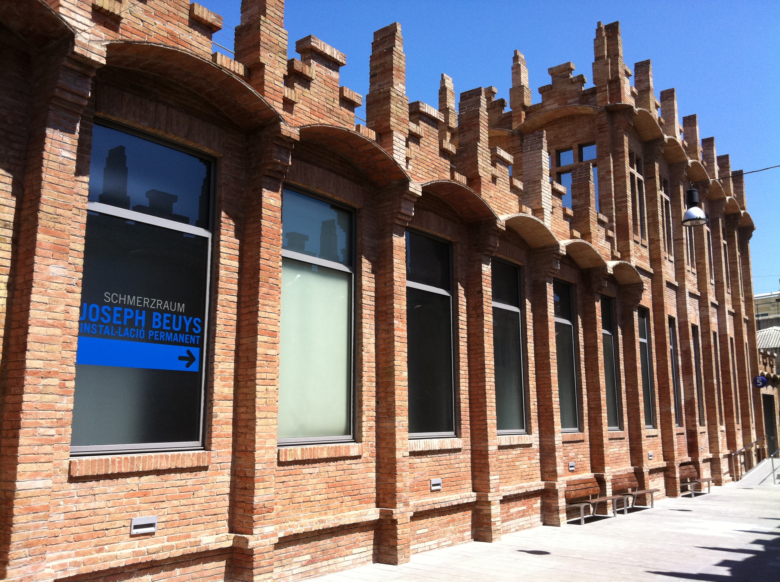 CaixaForum Barcelona CaixaForum Barcelona, guia a la sala de Joseph Beuys